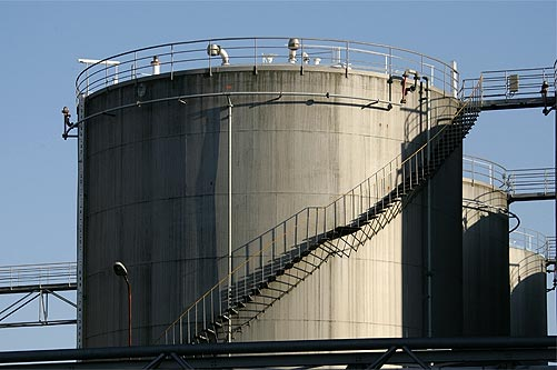 Tanks im Hafen- und Industrieareal von Birsfelden